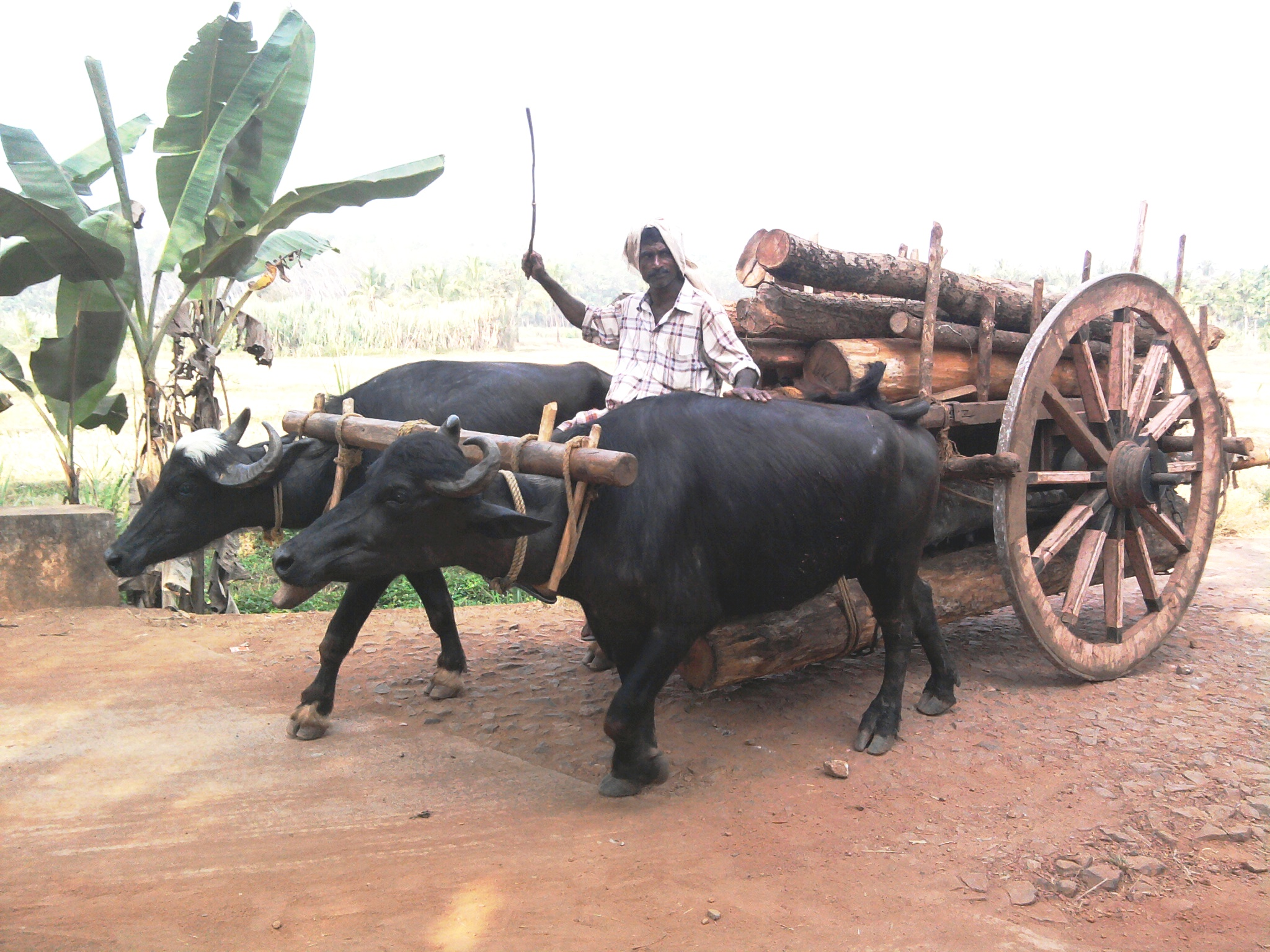 Bullock cart